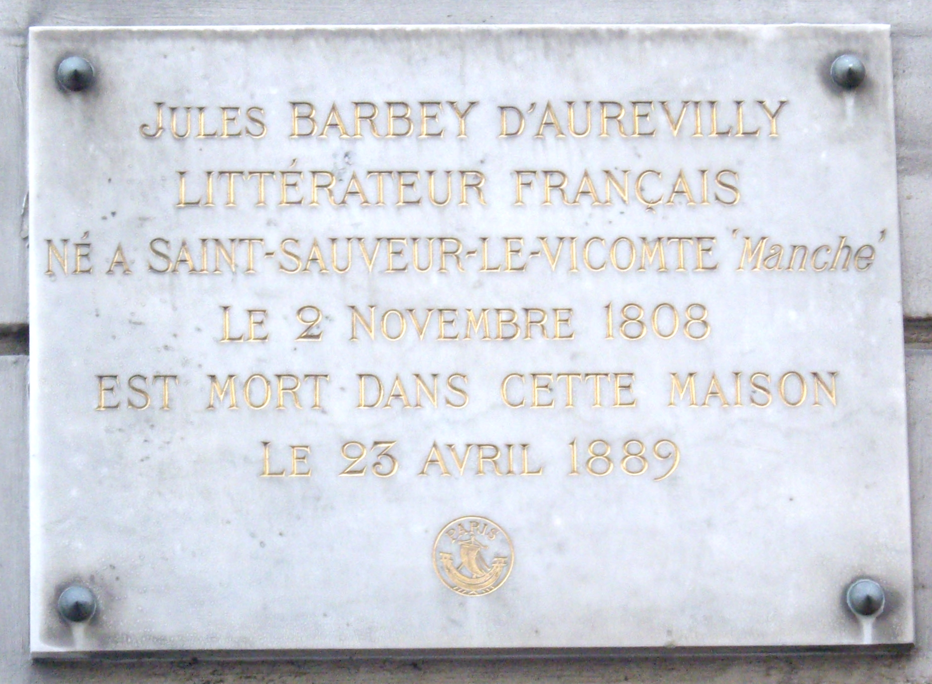 Plaque commémorative, 25 rue Rousselet, Paris 7e. « Jules Barbey d'Aurevilly, littérateur français, né à Saint-Sauveur-le-Vicomte (Manche) le 2 novembre 1808, est mort dans cette maison le 23 avril 1889. »